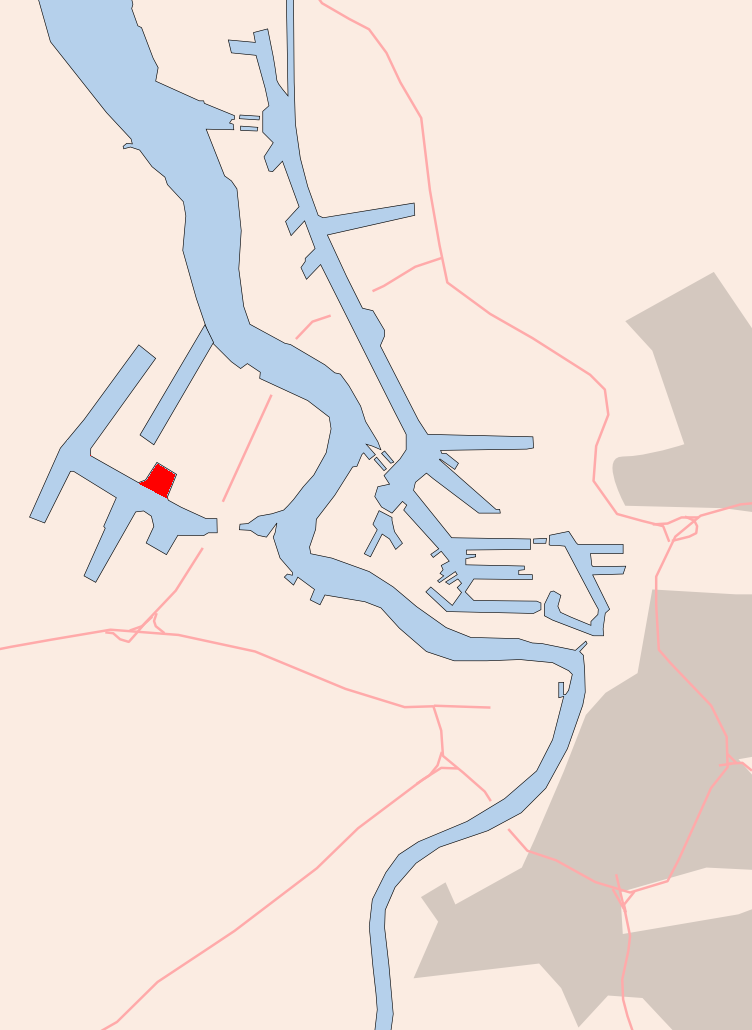 Antwerp , Noordelijk Insteekdok